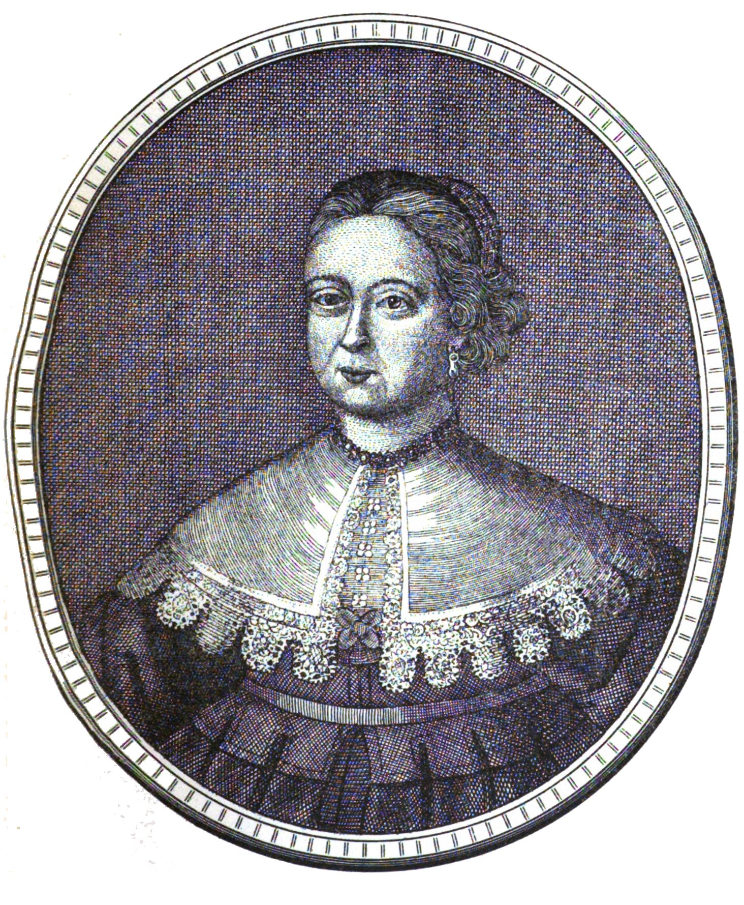 Agnes Fingerin. In: Neues Lausitzisches Magazin, Band 68, Anhang, Tafel II, Richard Jecht (Hrsg.), 1892